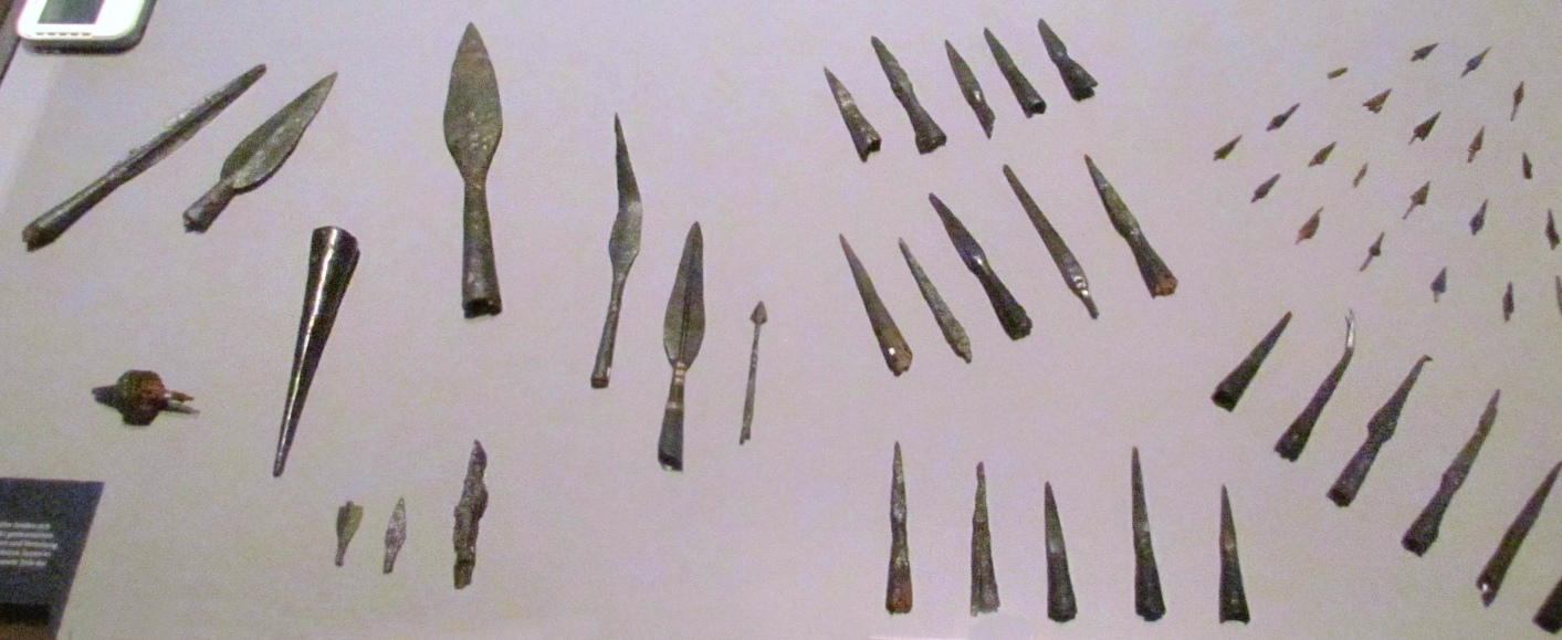 Fundstücke vom Harzhorn in der Ausstellung "Bewegte Zeiten. Archäologie in Deutschland" in Berlin